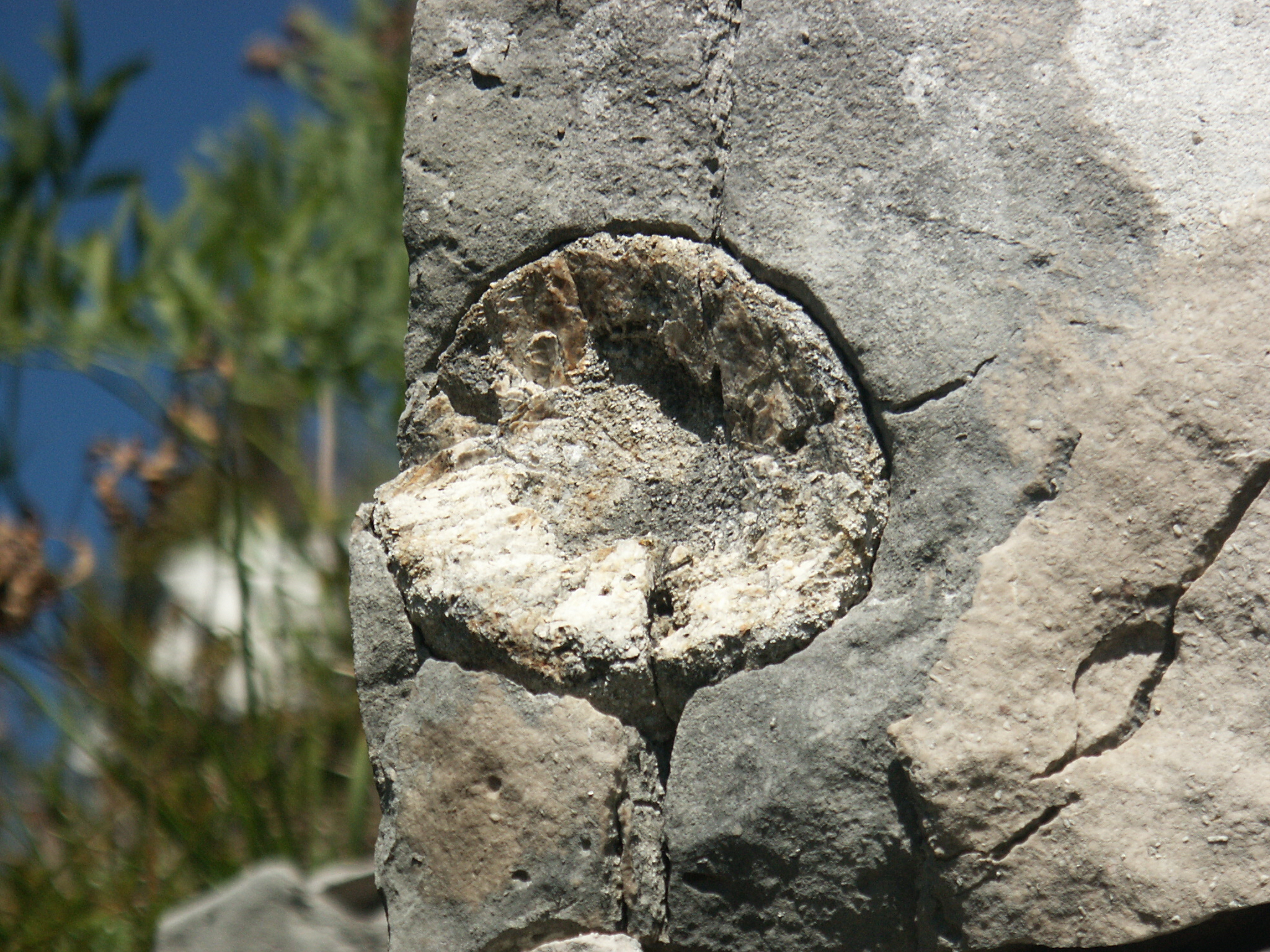 Felseinlagerung am kleinen Barmstoa (Kalk)